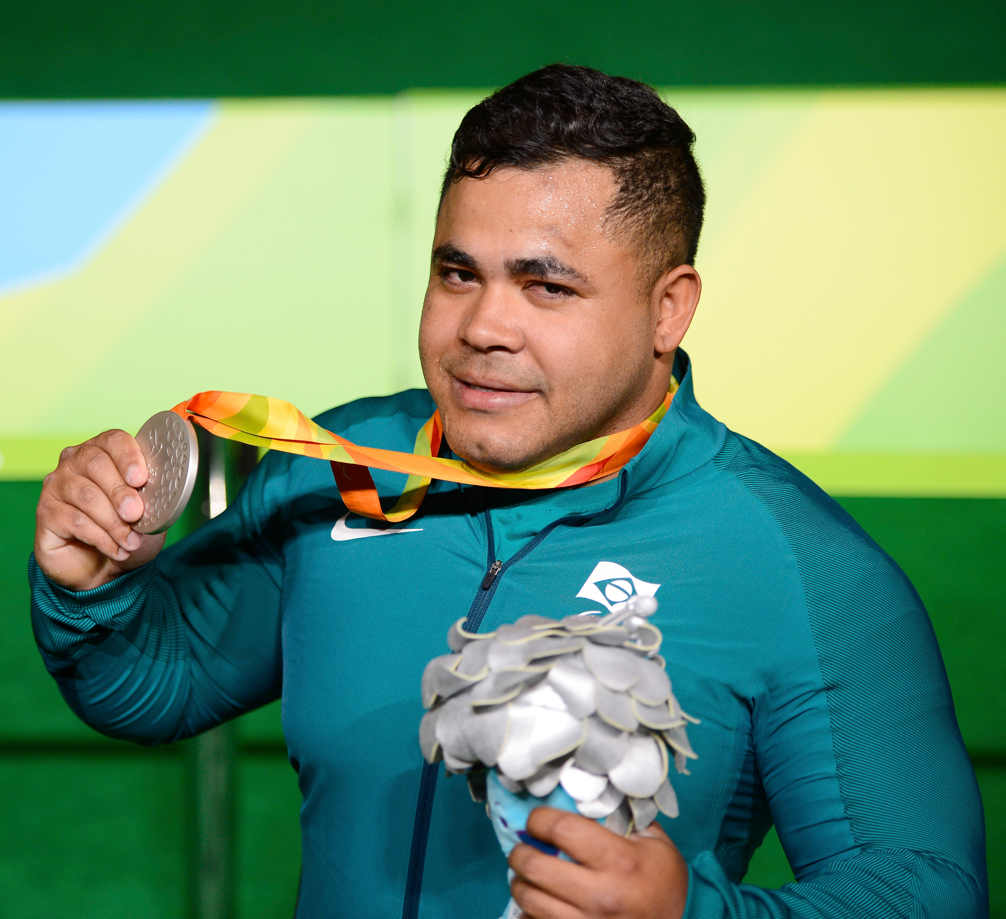 Rio de Janeiro - Evanio da Silva ganha medalha de prata para o Brasil no levantamento de peso, categoria 88 kg, nos Jogos Paralímpicos Rio 2016